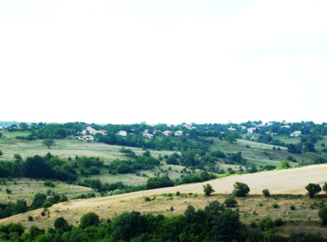 Поглед към село Баба Тонка, община Попово - юли 2008 год. Фото: Вл. Стойков